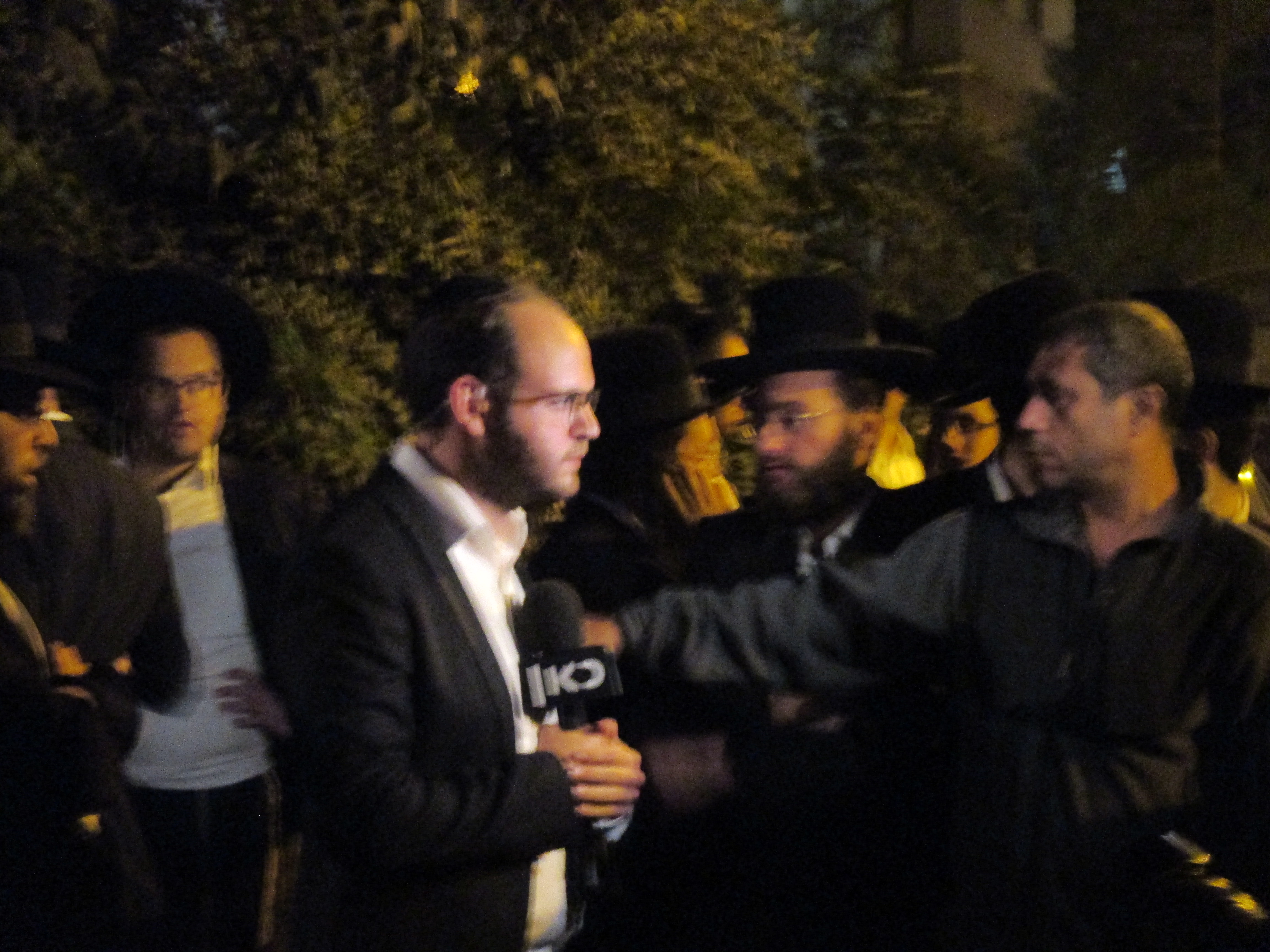 עקיבא וייס מדווח מכינוס מועצת גדולי התורה של אגודת ישראל